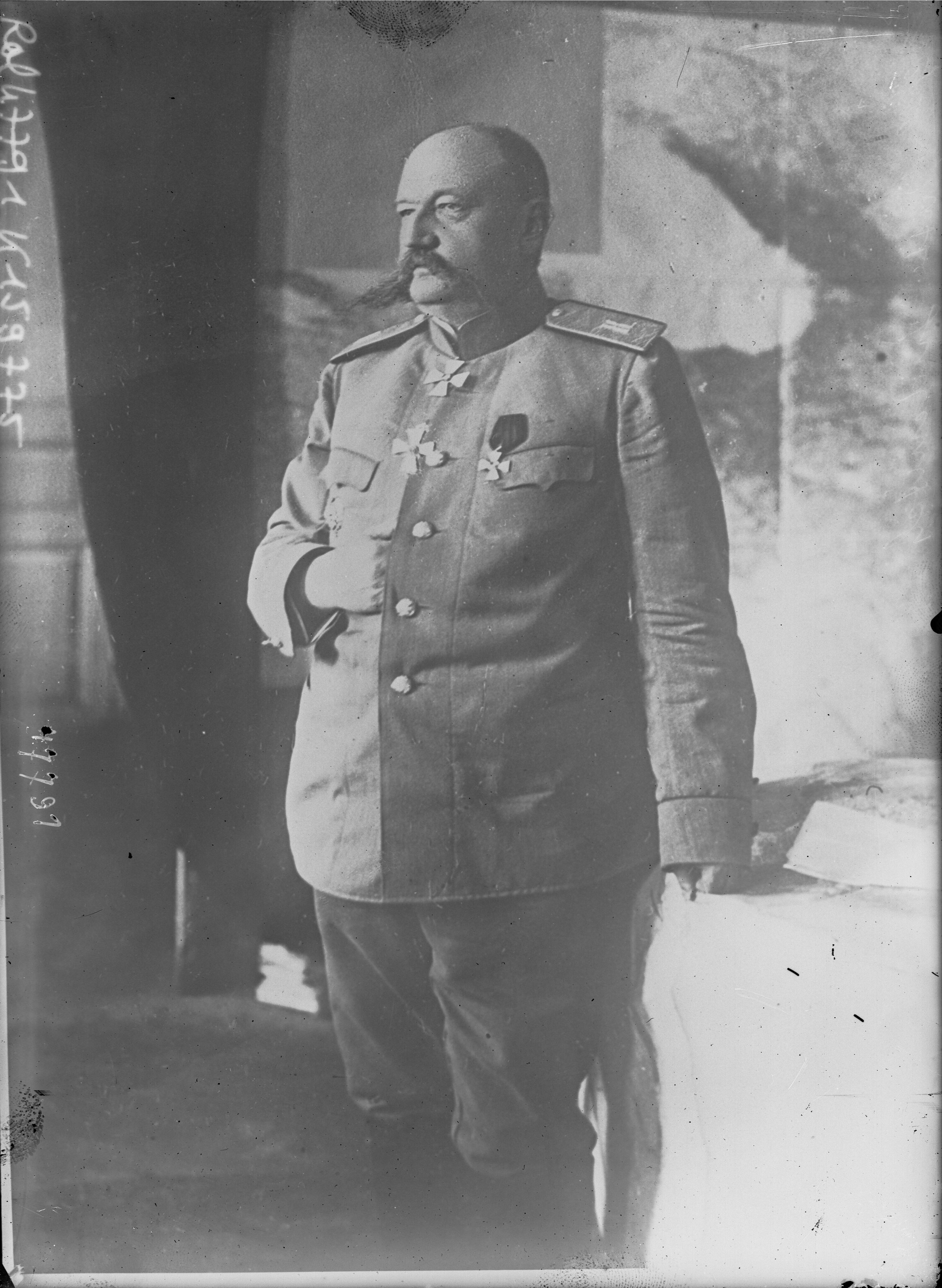 El general ruso Nikolái Yudenich en 1916.